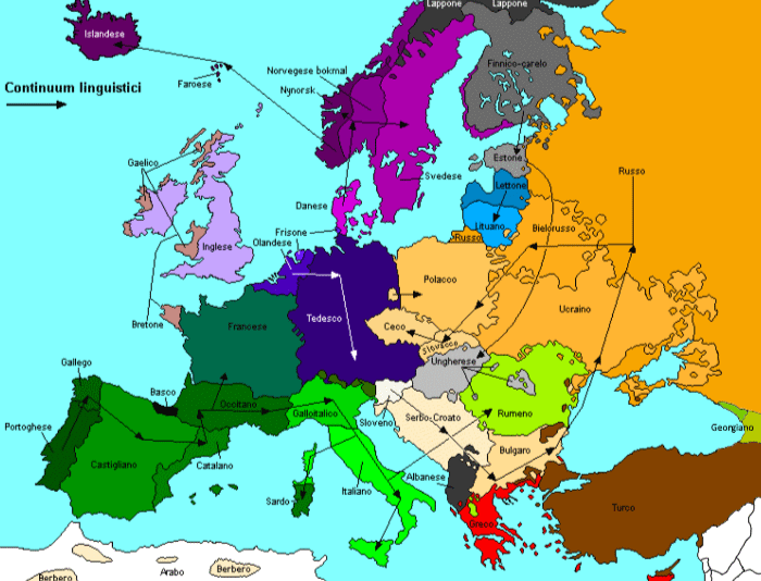 Los continuos dialectales más importantes de Europa.